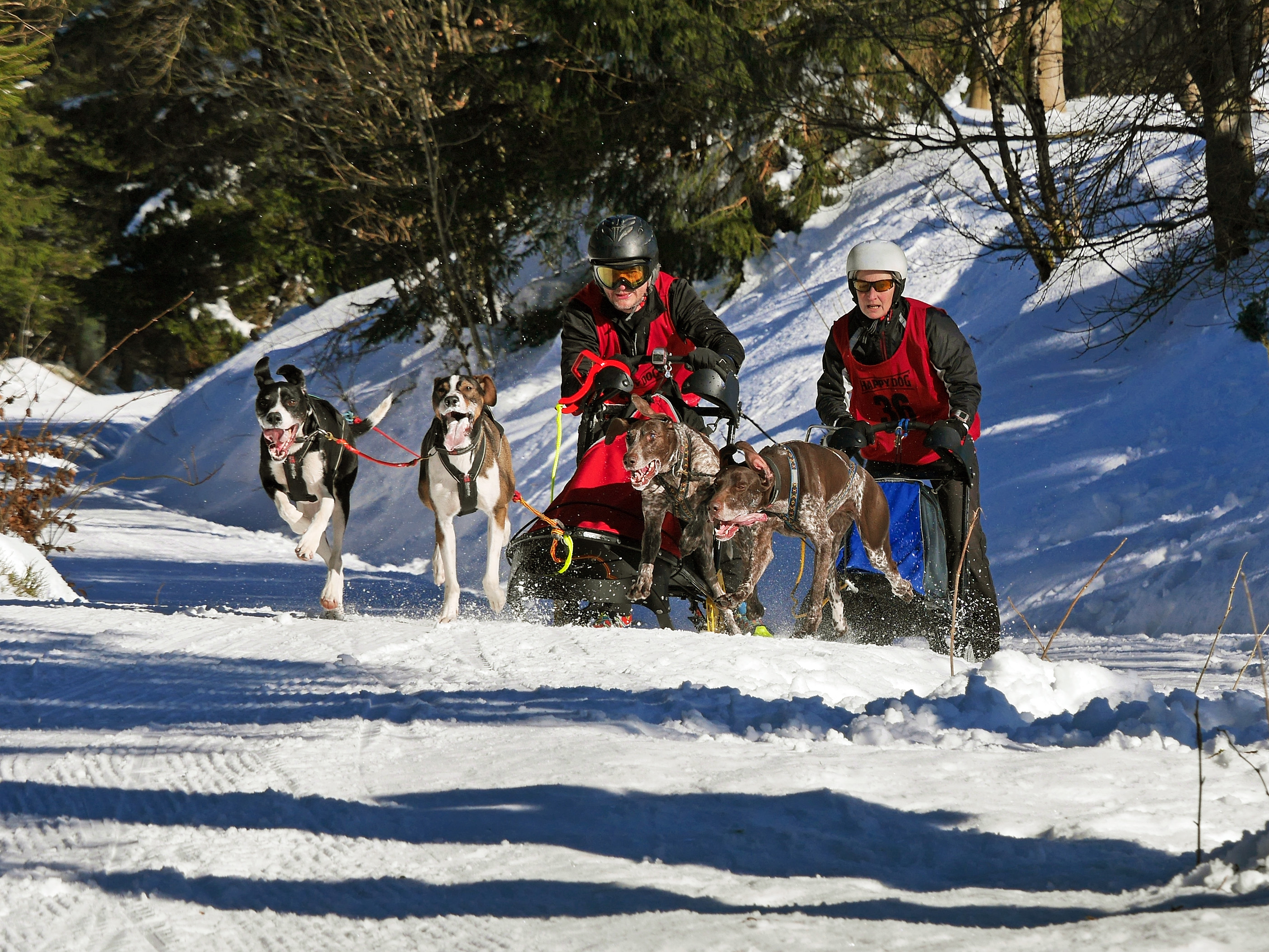 Überholmanöver beim Schlittenhunderennen zur Deutschen Meisterschaft 2015 in Frauenwald (Thüringer Wald).